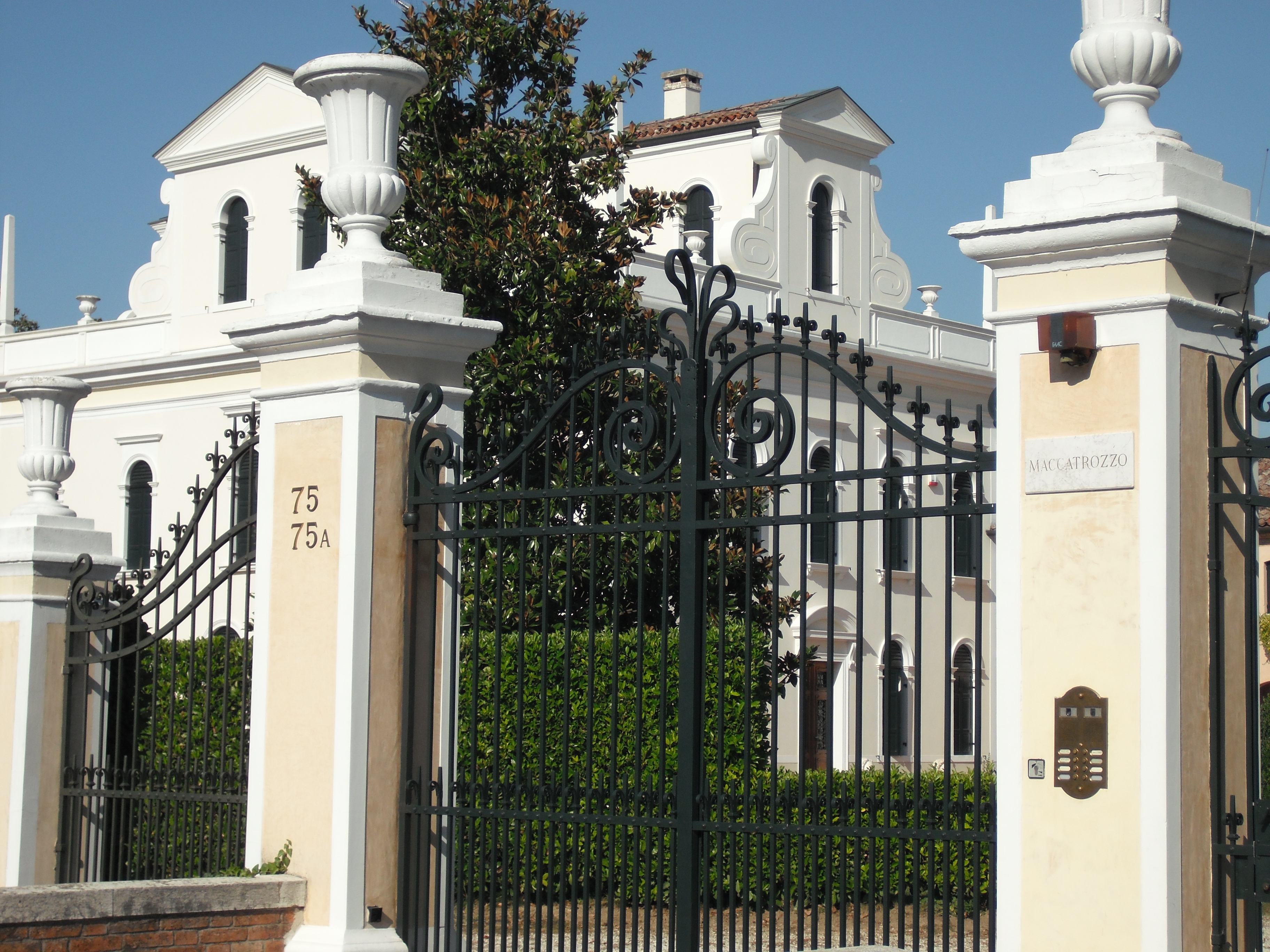 Villa Veronese, a Mogliano Veneto.